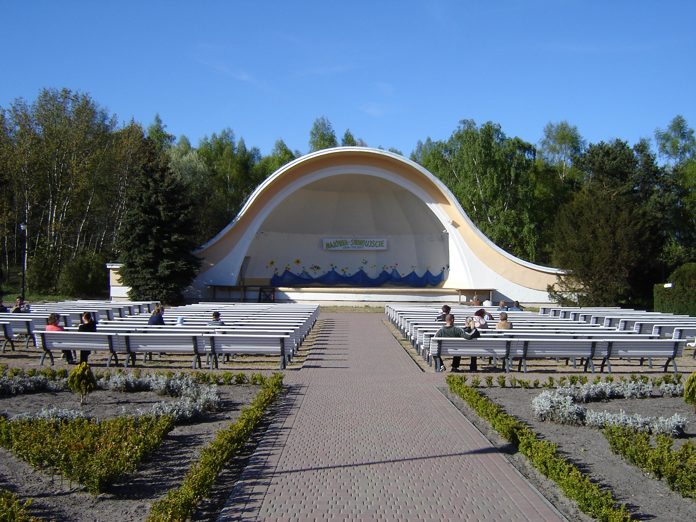 Świnoujście - muszla koncertowa